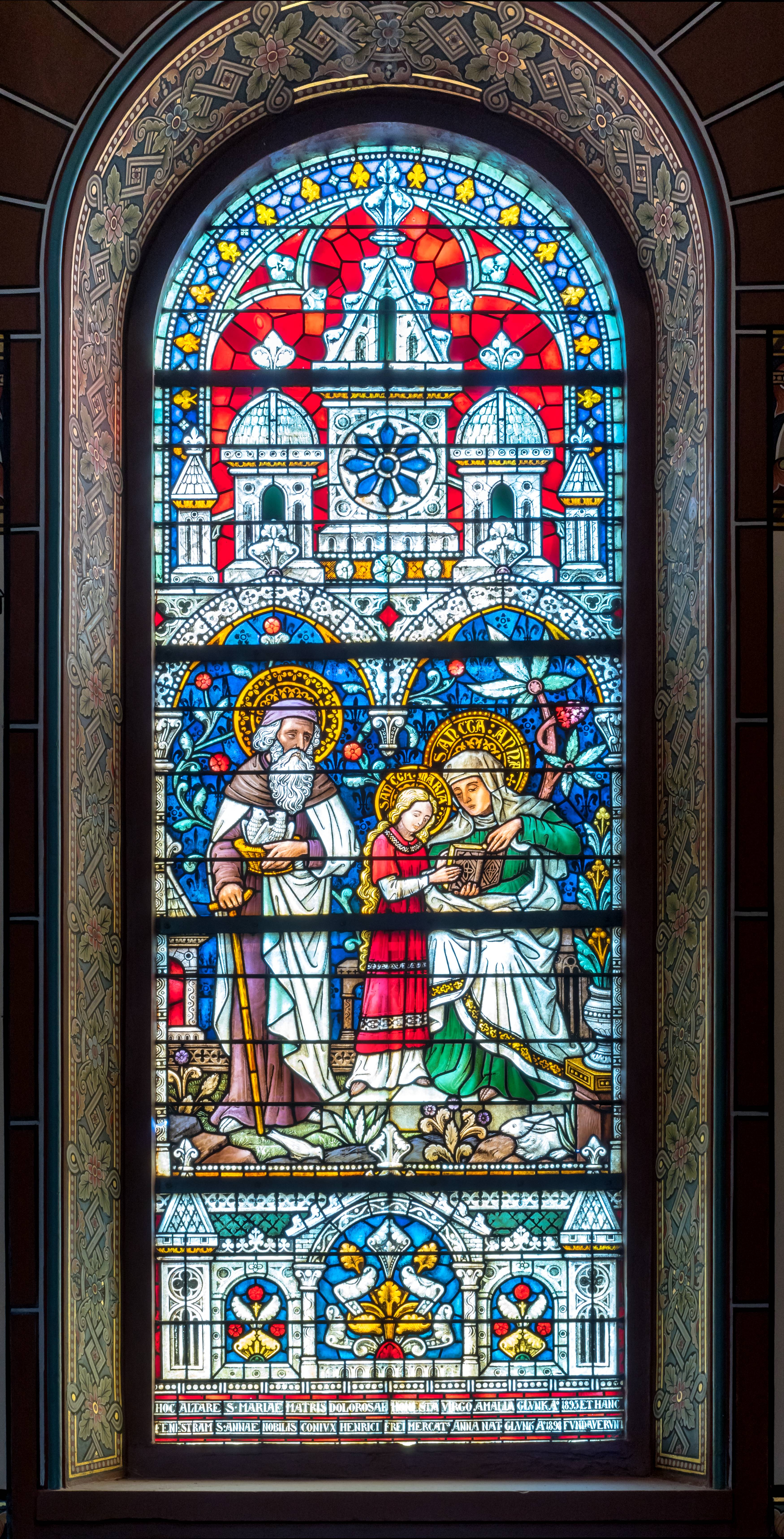 St. Peter und Paul in Bonndorf, Glasfenster im Langhaus in der Kirche. Motiv: Anna bringt Maria im Beisein von Joachim das Lesen bei HOC ALTARE S MARIAE MATRIS DOLOROSAE HONESTA VIRGO AMALIA GLVNK A° 1895 ET HANC FENESTRAM S ANNAE NOBILIS CONIVX HENRICI FREI MERCATs ANNA NAT GLVNK A°1898 FVNDAVERVNT [